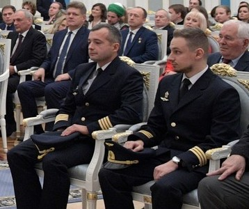 Герои Российской Федерации Дамир Касимович Юсупов и Георгий Александрович Мурзин